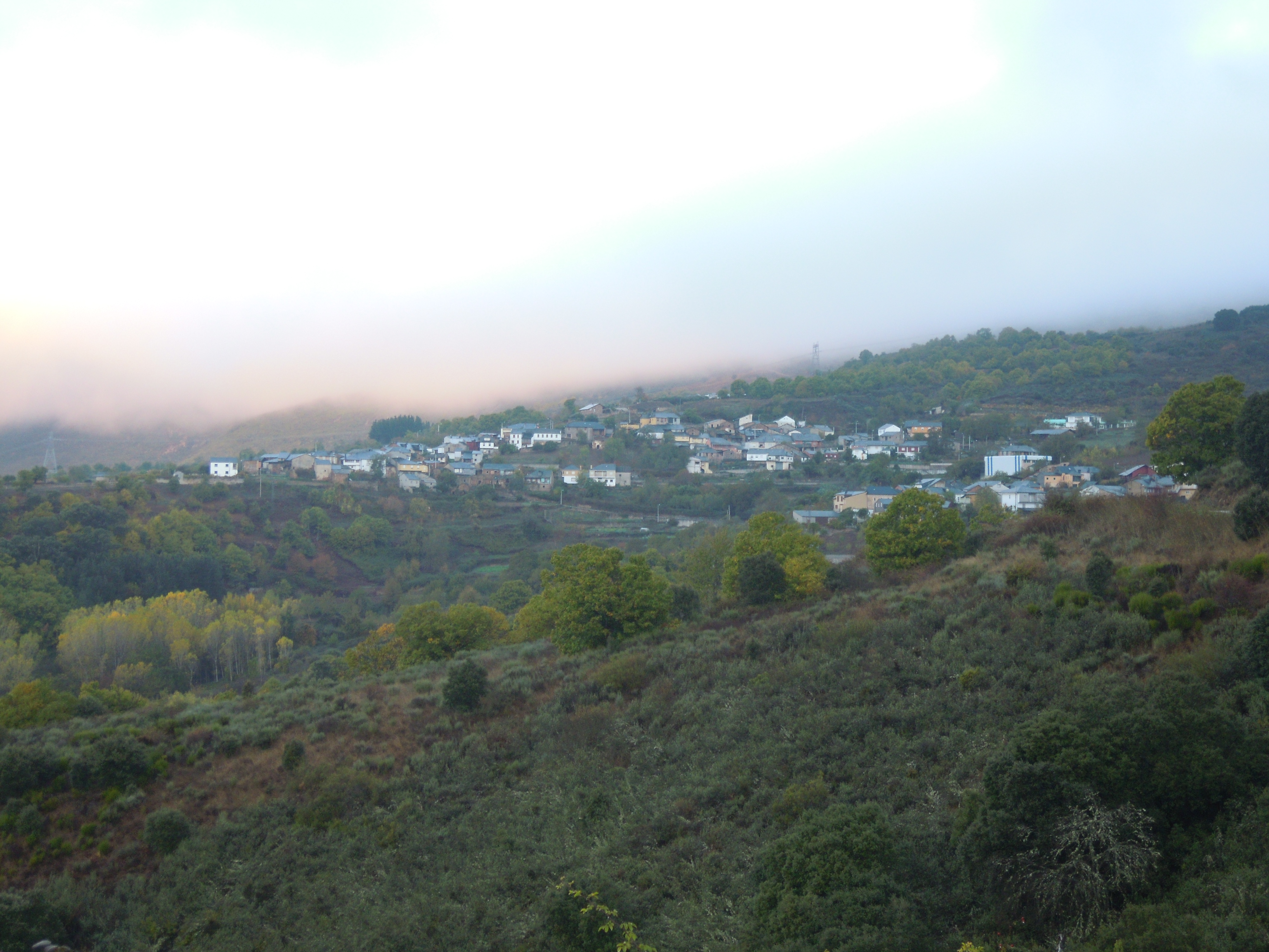 Vista xeral de Biobra (Rubiá)